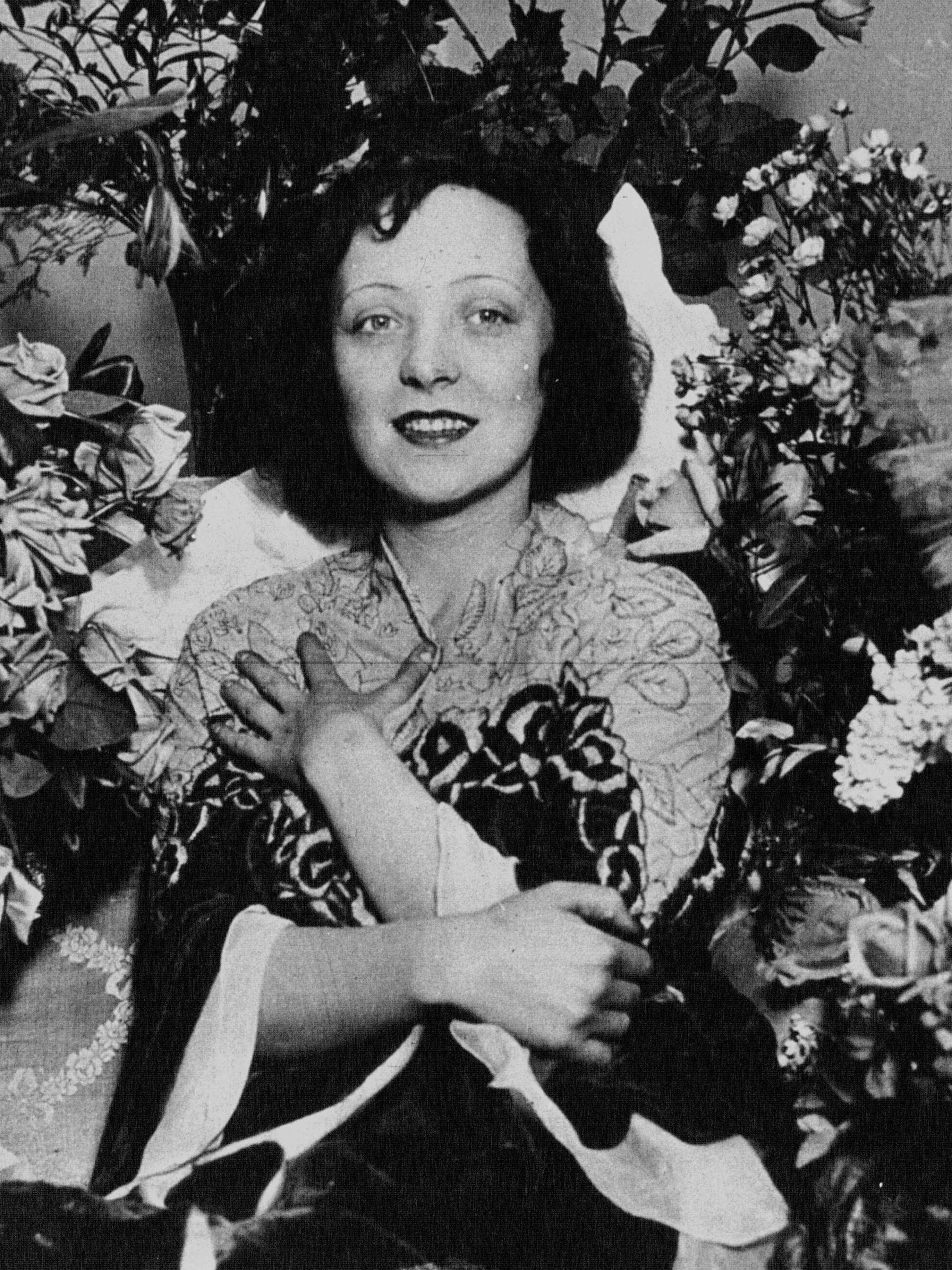 German actress and singer Anny Ahlers (1907-1933).